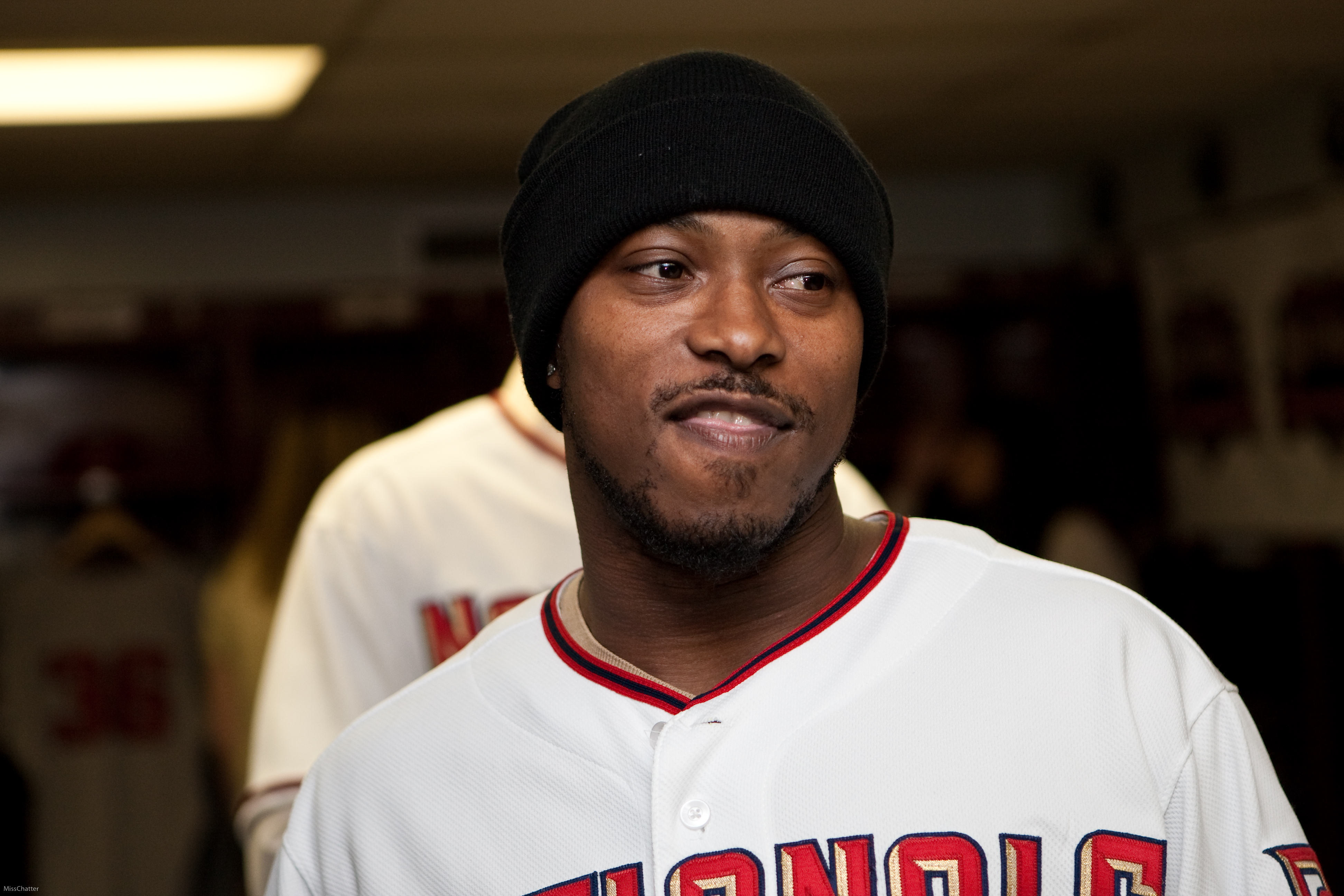 Willie Harris